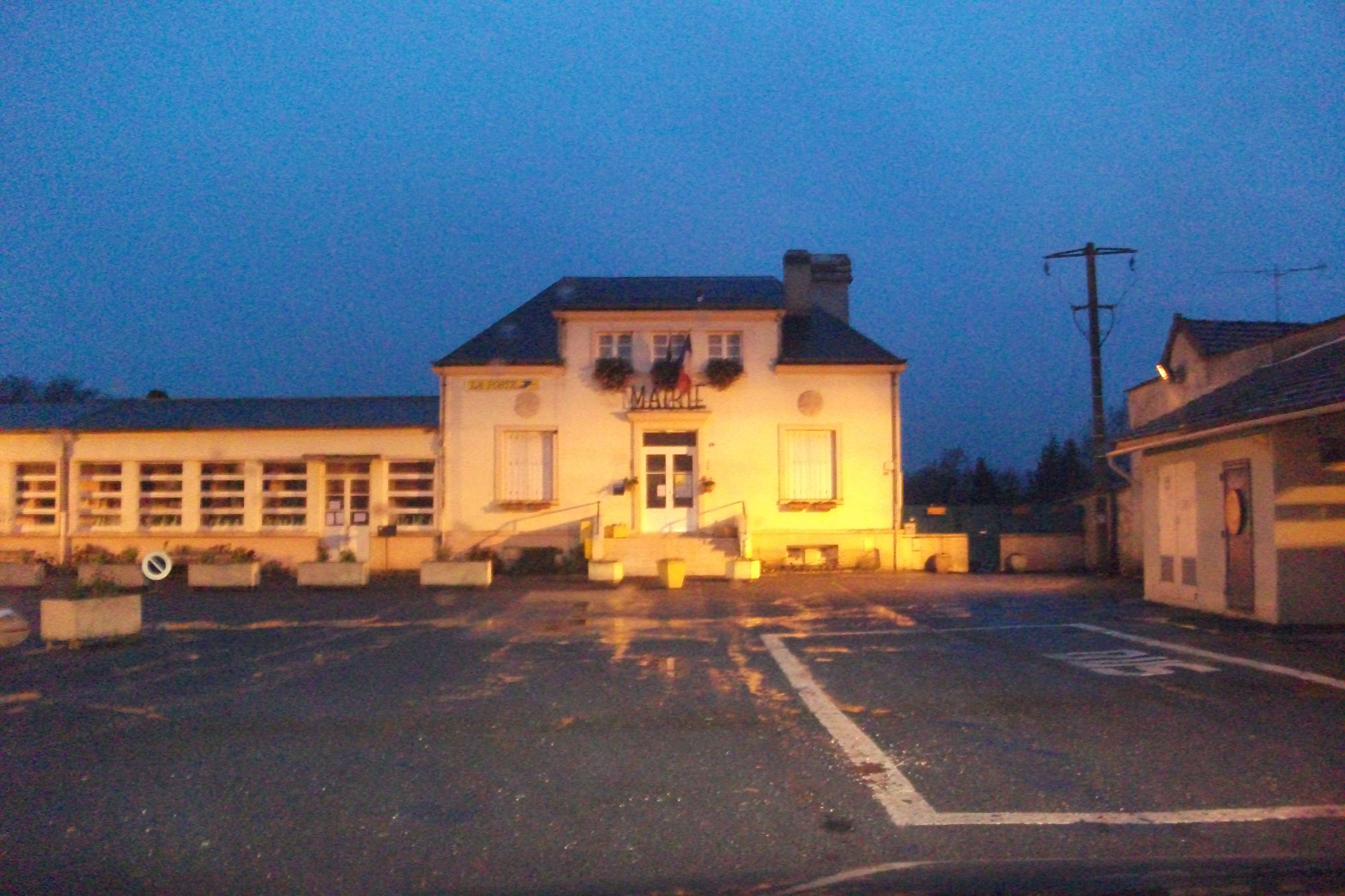 Treslon, sa_mairie et sa place centrale.